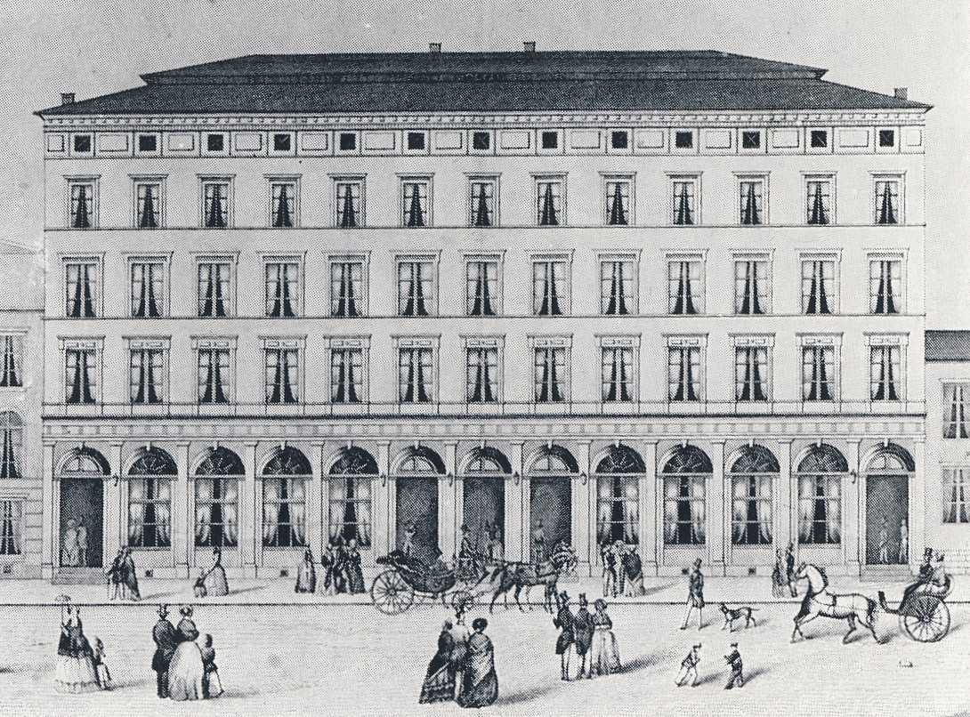 Folckerska huset på Brunkebergtorg i Stockholm (numera riven)